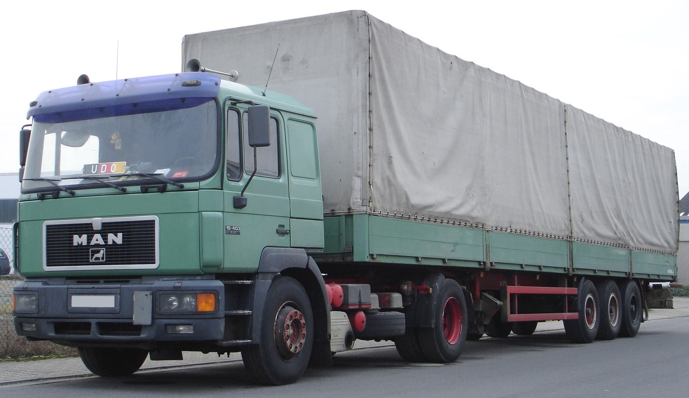 MAN F2000 Pritschensattelzug